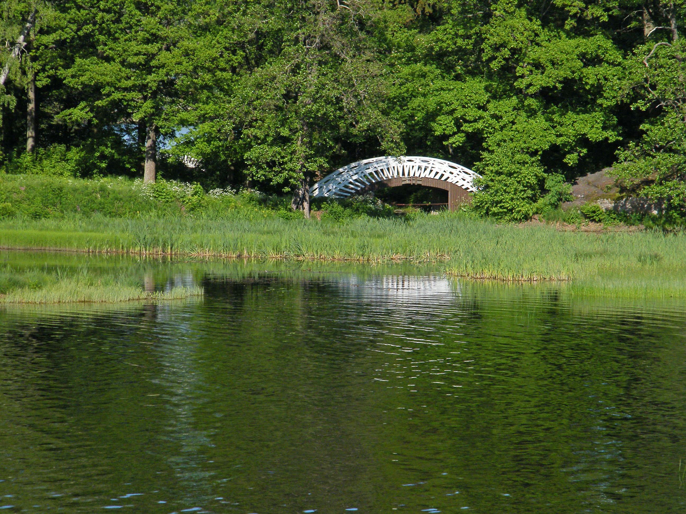 Китайский мостик в парке Монрепо